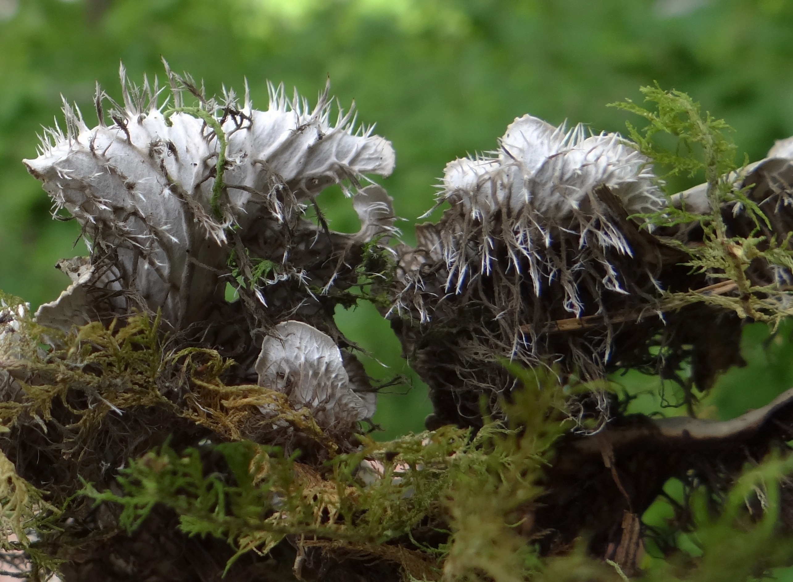 Peltigera canina (habitat:Tatra Mountains, Dolina Małej Łąki, Szatra)